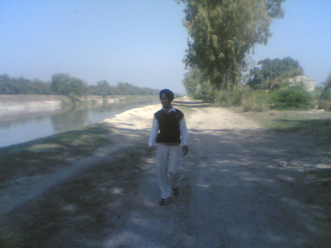 Rajasthan Feeder Canal ( Indira Gandhi Canal), state of Punjab, India.